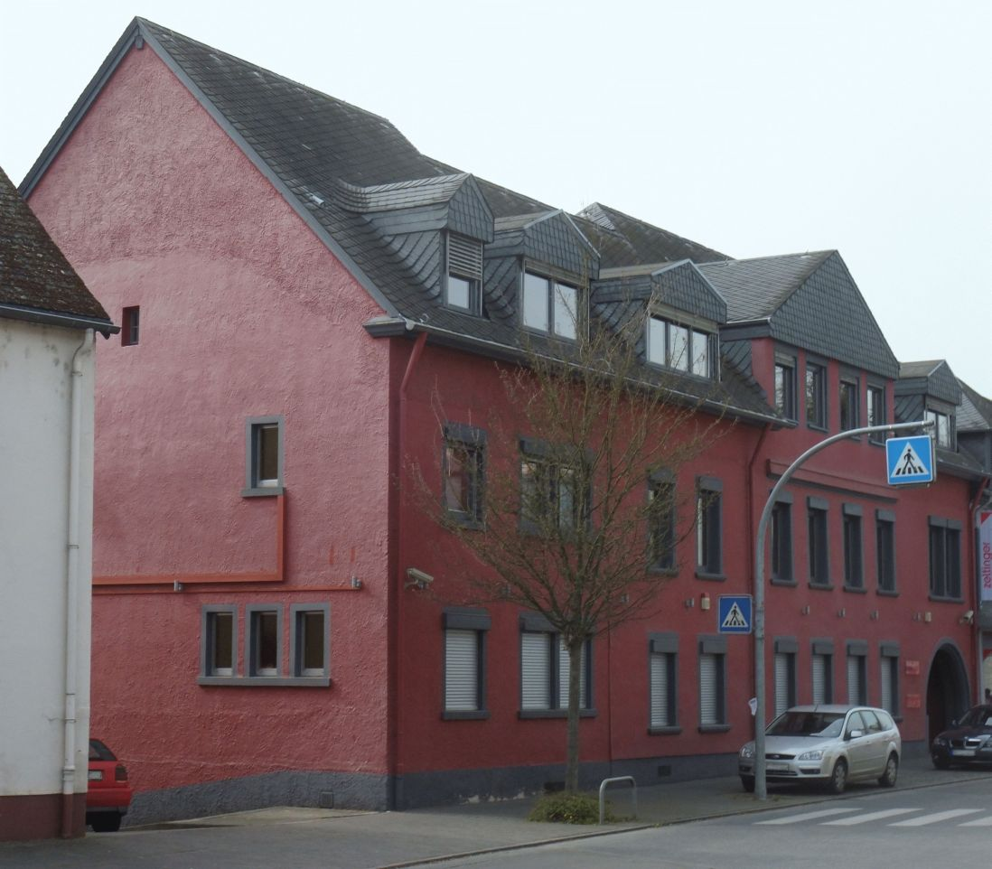 Verwaltungsgebäude der Verbandsgemeinde Ruwer bis zum Jahre 2005 in Trier-Ruwer, Rheinstraße